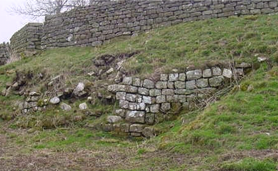 Mauerreste an der NW-Ecke des Kastell Bremenium/Rochester (GB)